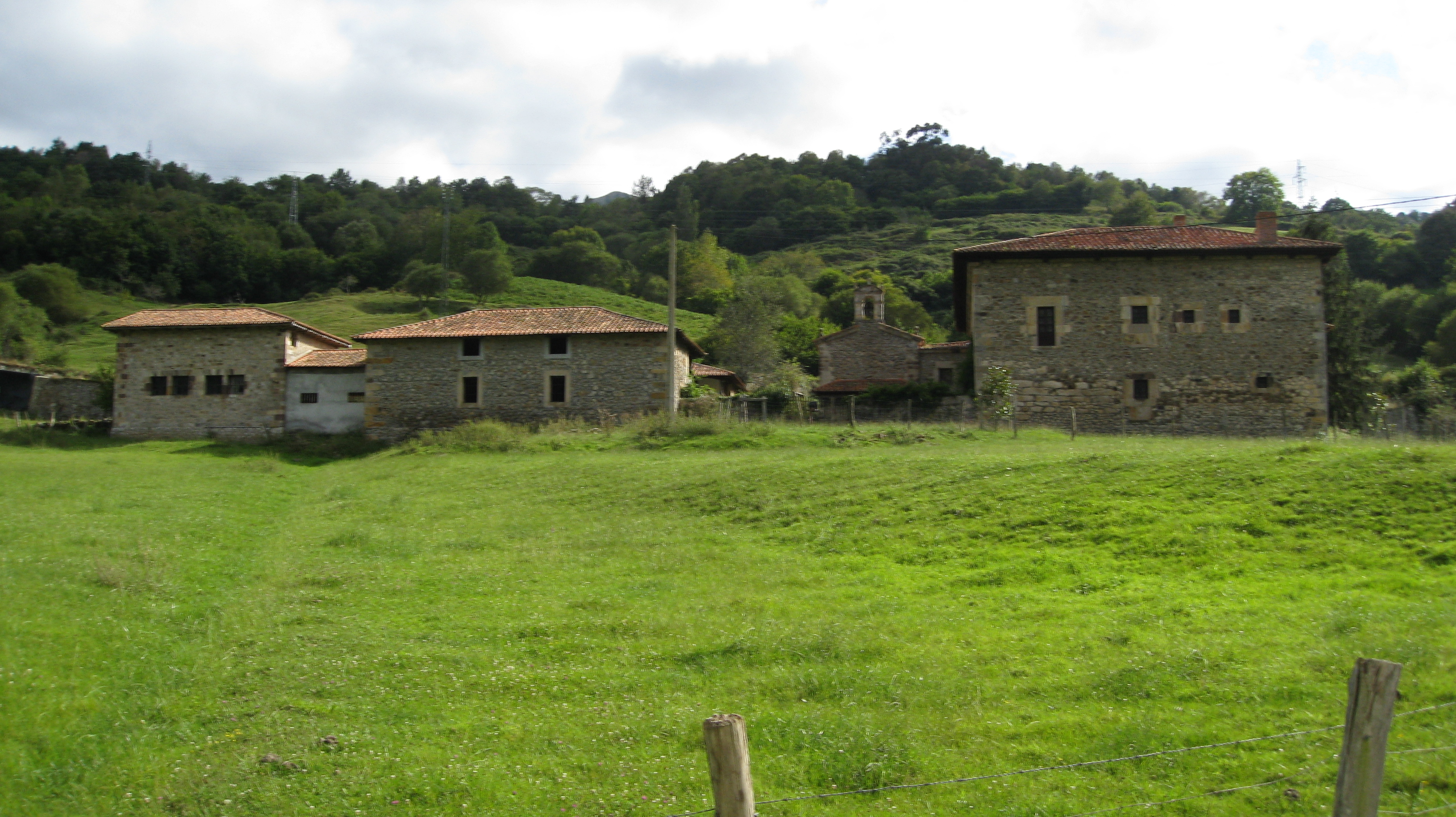 Palacio de San Román de Panes, Peñamellera Alta, Asturias. España